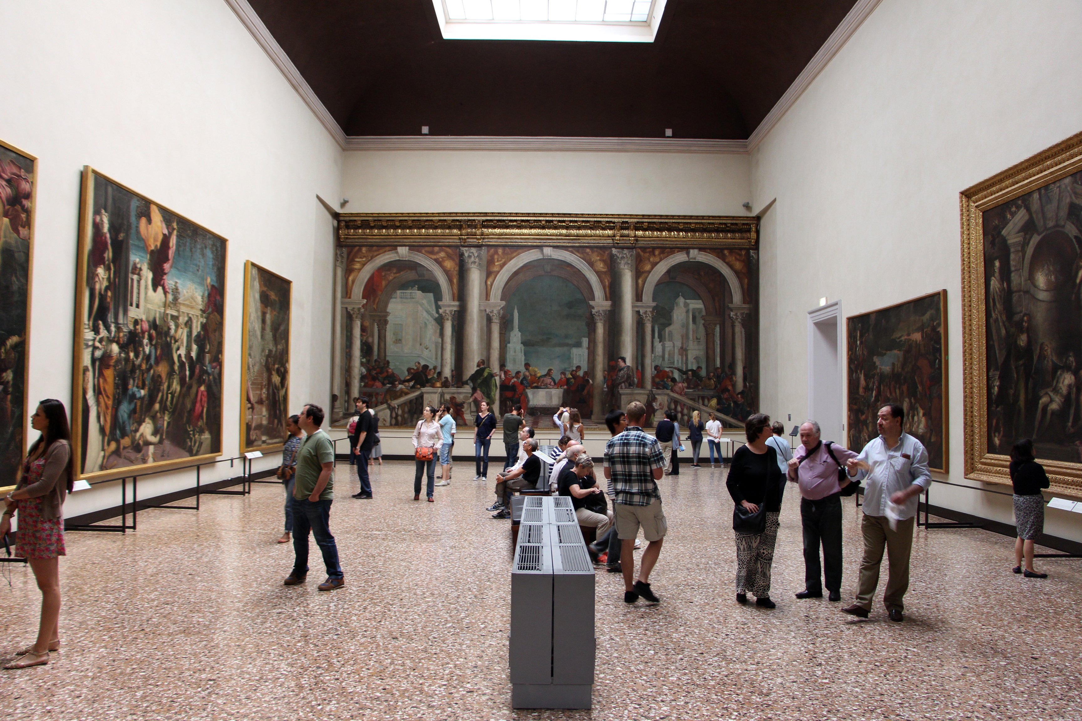 Gallerie dell'Accademia - MIBAC This is a photo of a monument which is part of cultural heritage of Italy.